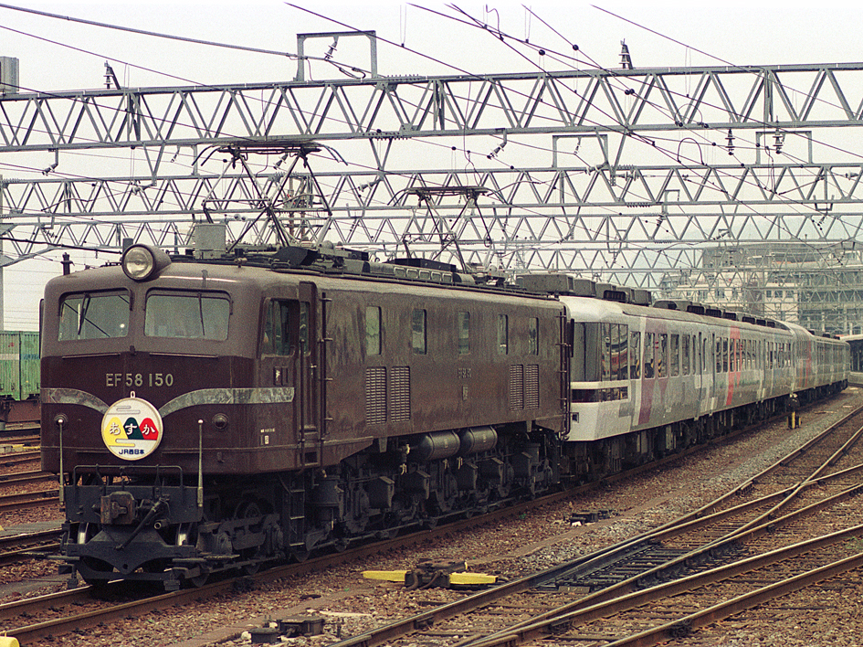 JR西日本 EF58 150けん引「あすか」